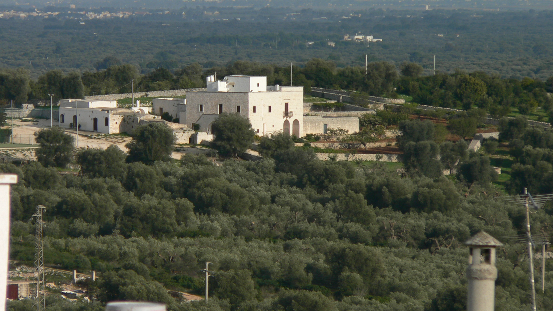 masseria sita nell'agro del comune di Ceglie Messapica